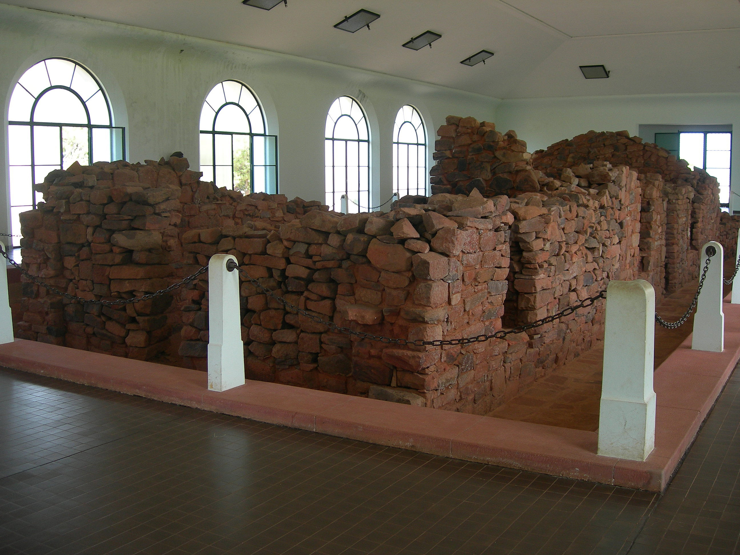 Restos de la casa natal del General José Francisco de San Martín en la ciudad de Yapeyú, provincia de Corrientes